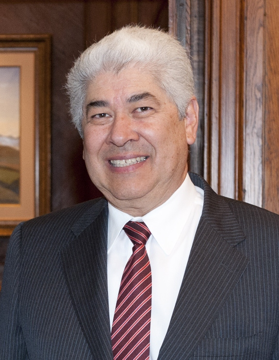 El Lehendakari recibe al embajador de México, Francisco Javier Ramírez Acuña